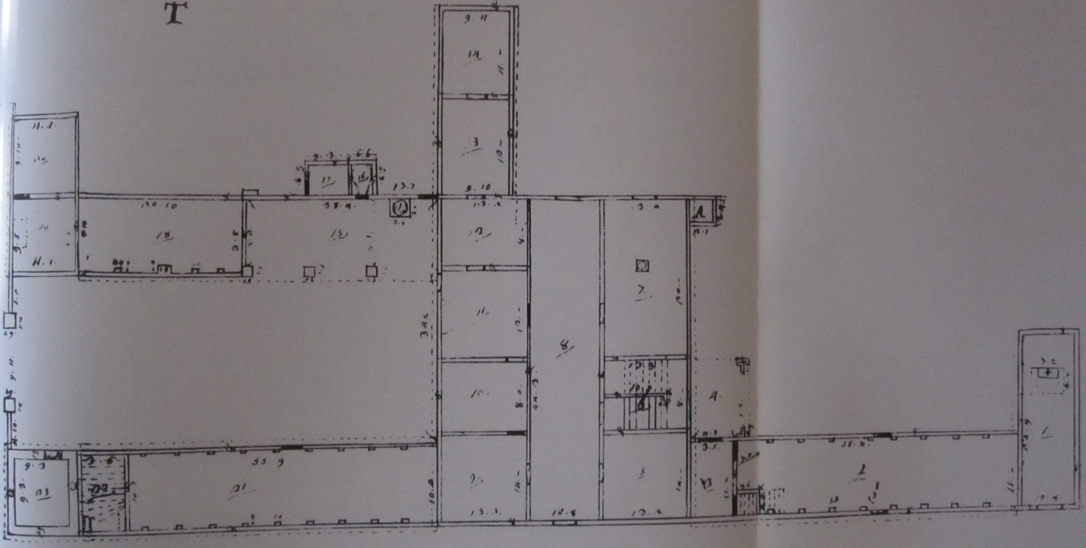 Pianta del Monastero di Santa Croice di Salara (Ro)